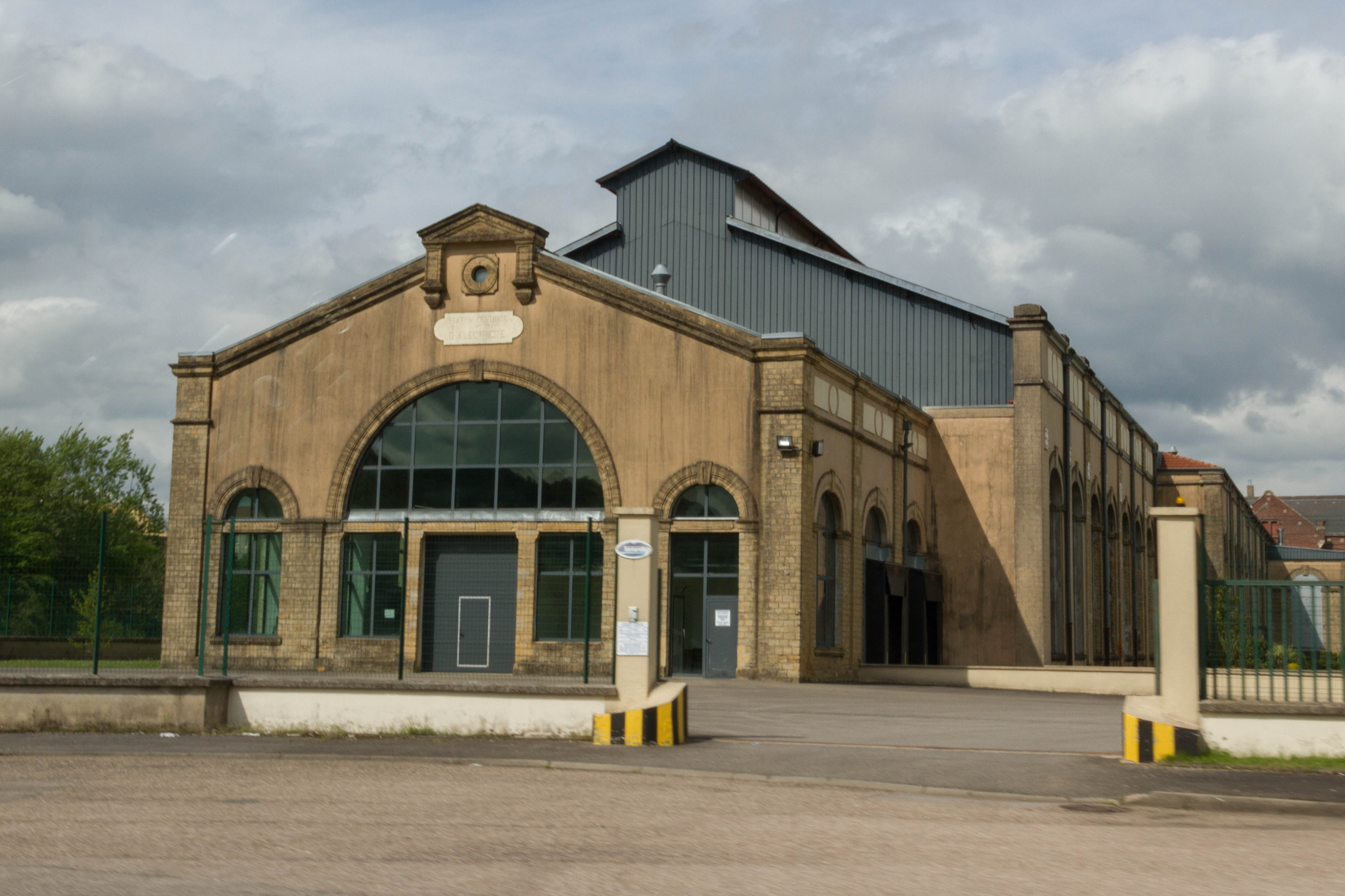 Les soufflantes, grands bureaux des aciéries de Longwy. Ancien bâtiment "les soufflantes", sert maintenant d’entrepôt.